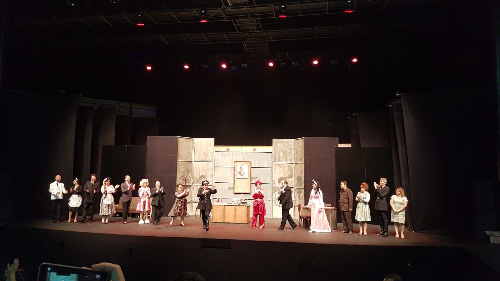 Cibali Karakolu son perde. 3 Haziran 2018, Cemil Topuzlu Açık Hava Sahnesi.